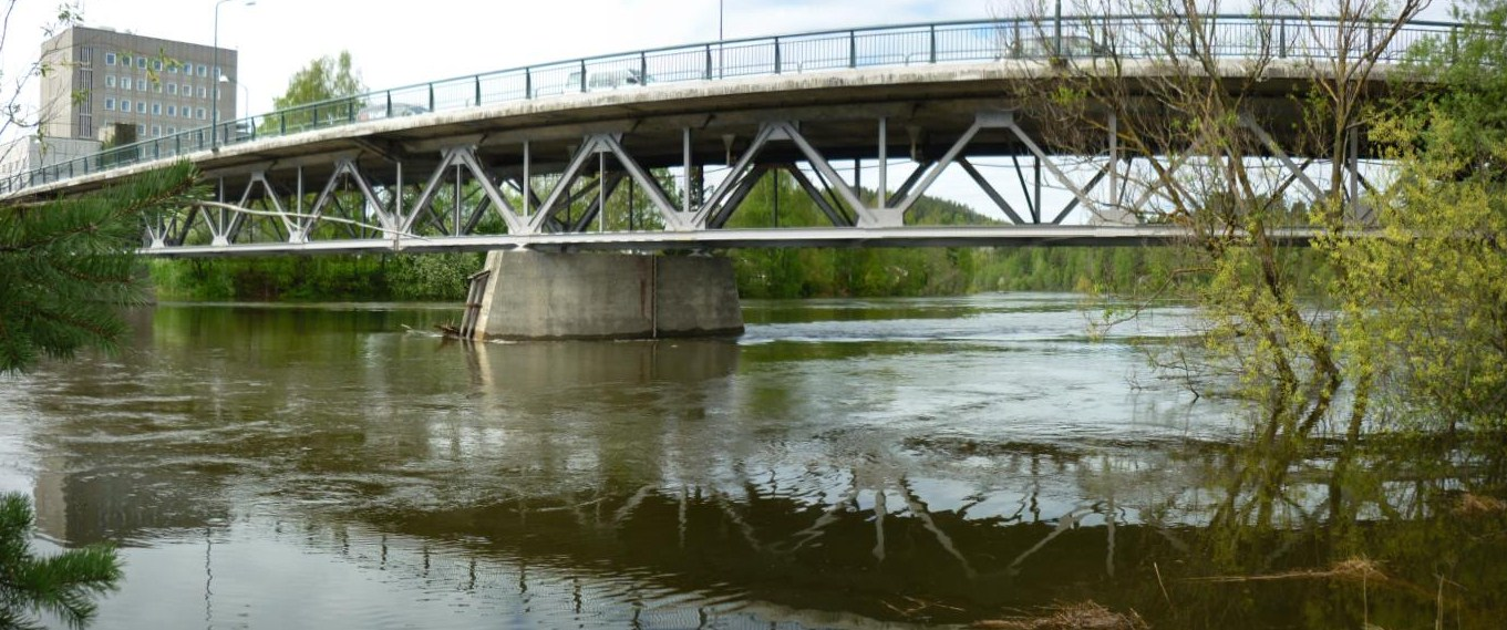 Kvernbergsund bru over Storelva, med Ringerike rådhus i bakgrunnen. Bildet ble tatt under storflommen våren 2013.